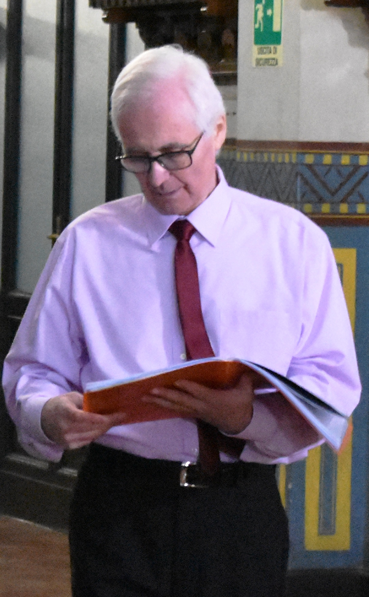 Foto